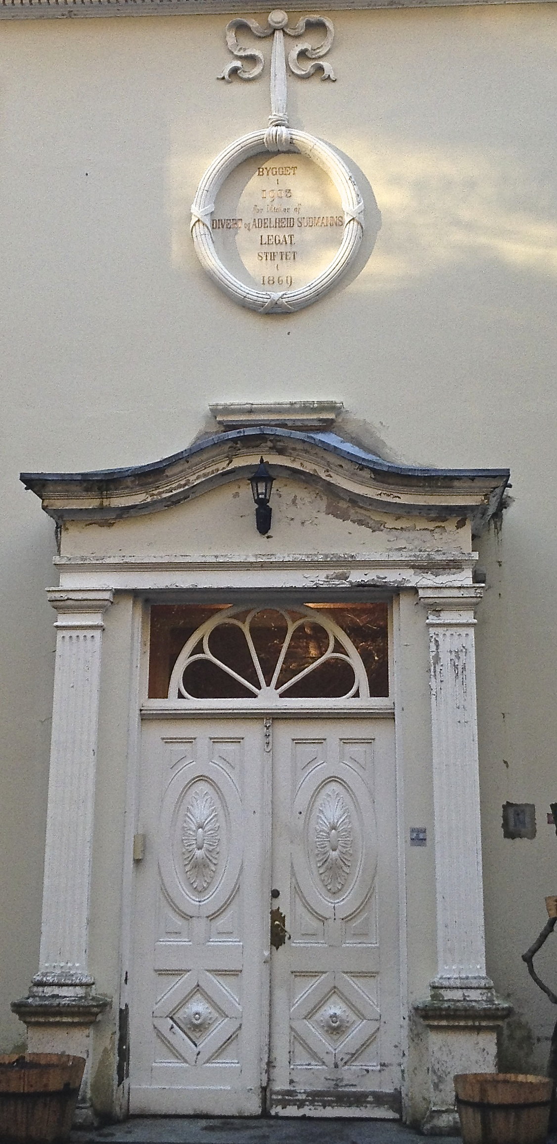 Inngangsportalen på baksiden av bygningen.